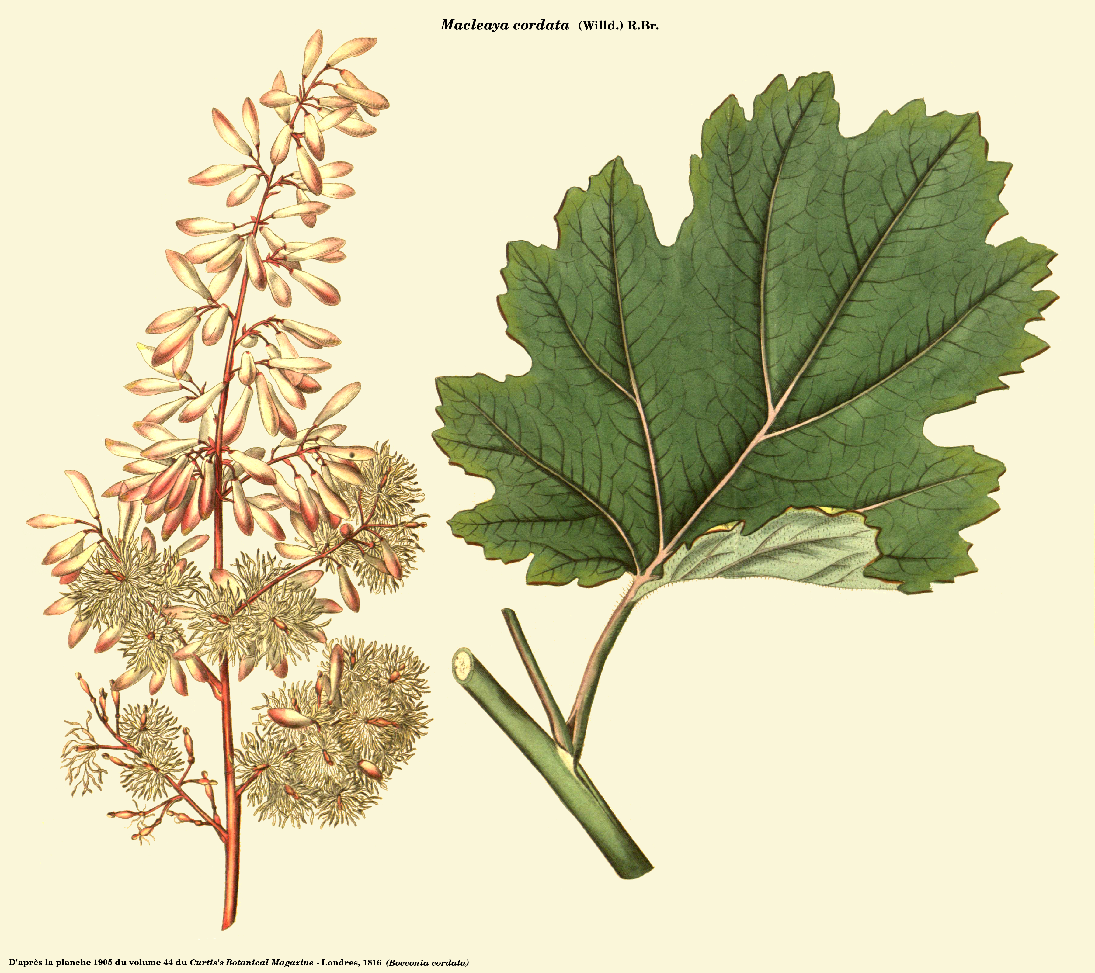 Macleaya cordata - D'après la planche 1905 du volume 44 du Curtis's botanical magazine - Londres, 1816 - Planche reprise par D. Prévôt sous Gimp